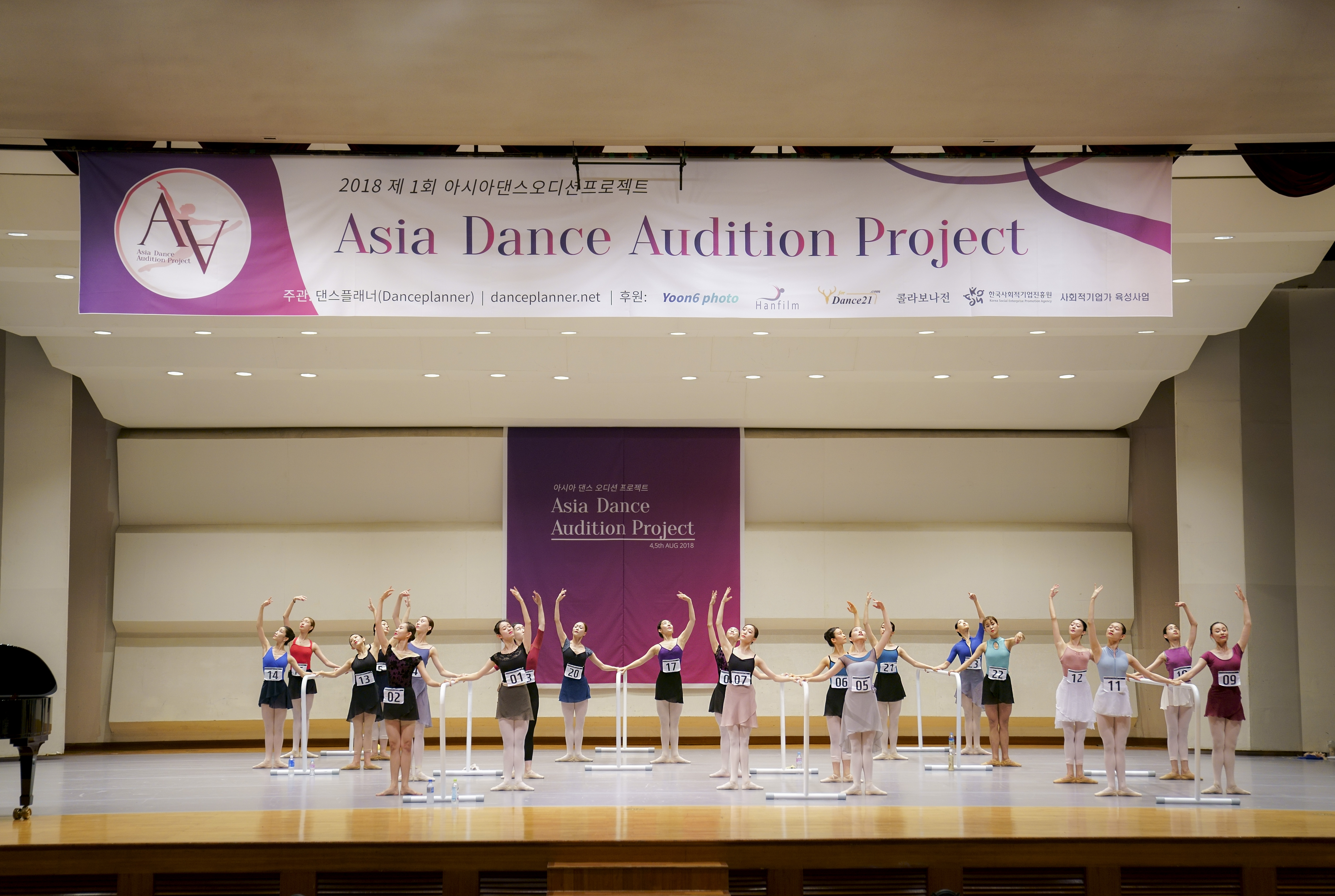 Asia Dance Audition_Round1 (Bar)